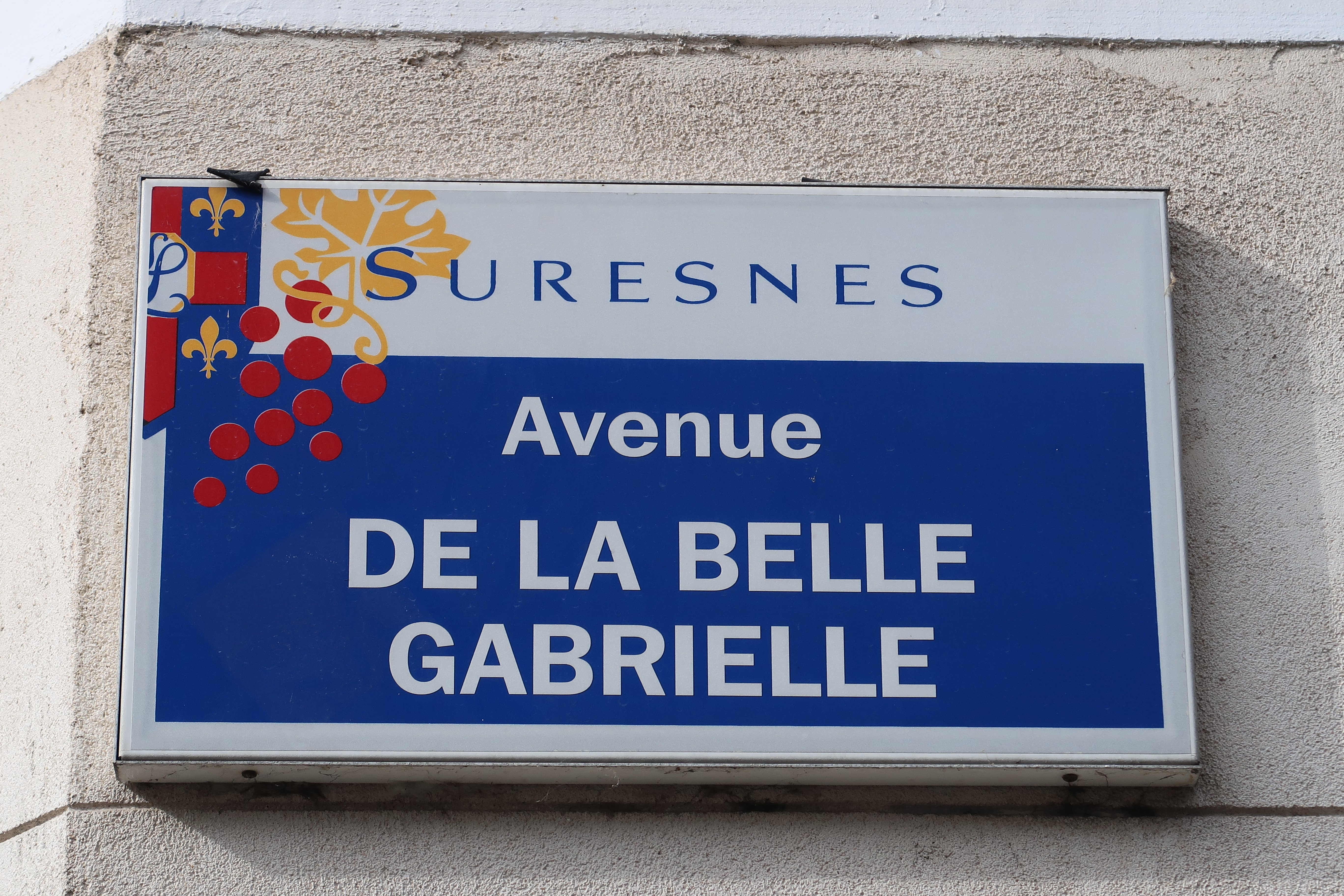 Plaque de l'avenue de la Belle-Gabrielle à Suresnes (Hauts-de-Seine).